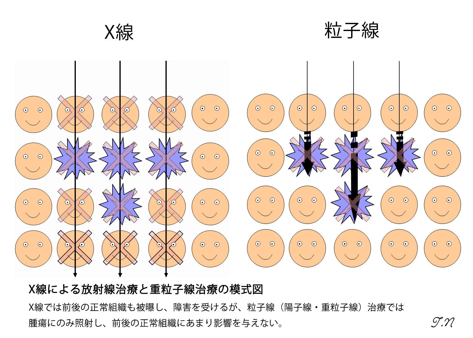 X線及び粒子線（陽子線・重粒子線）による放射線治療において、正常細胞が受ける障害についての模式図